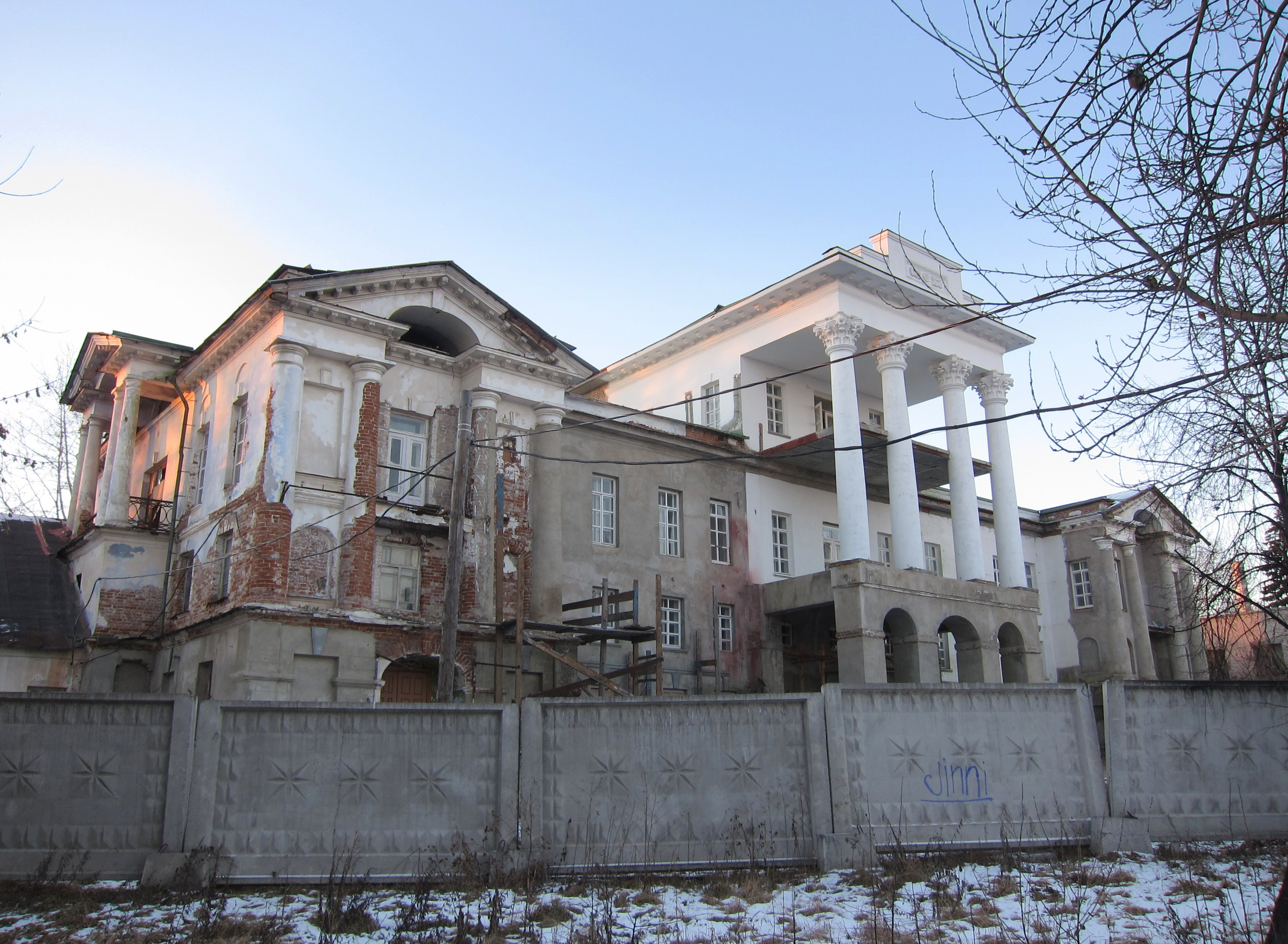 Усадьба заводовладельца 'белый дом' (Челябинская область, Кыштым, Карла Маркса площадь, 2)